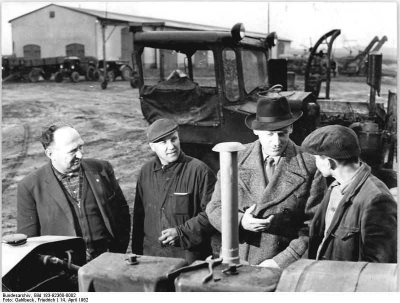 Neukirchen, Traktoristen im Gespräch Zentralbild Gahlbeck 14.4.1962 Aktiv des Bezirkstages Kerl-Marx-Stadt kontrolliert Bestellarbeiten In wenigen Einsatztagen schnelle Fortschritte bei den Bestellarbeiten erzielen zu helfen, das ist die Aufgabe, die sich das zeitweiligen Aktiv für die Frühjahrsbestellung in der Ständigen Kommussion für Landwirtschaft des Bezirkstages Karl-Marx-Stadt gestellt hat. Den Aktiv gehören Fachleute des Feldbaues und erfahrenen Funktionäre gesellschaftlicher Organisation an. Jedes Aktivmitglied ist für die Anleitung eines bestimmten Kreises verantwortlich. Zu den Akriv gehört auch der stellvertretende Vorsitzende der Kommission Landwirtschaft beim Bezirkstag und Sekretär des DBD Bezirksvorstandes Werner Seifeft. Er übernahm die Anleitung des Kreises Werdau, der kurz vor dem Abschluß der Getreideaussat steht. UBz: Mit den Traktoristen der MTS Neukirchen, Kreis Werdau, berät hier der Bezirksbeauftragte des Aktivs der Ständigen Kommission Werner Seifert (2.v.rechts) über den schnellen Einsatz aller Maschinen und Geräte. (Links) der MTS-Direktor Willi Bellmann, rechts Trektorist Gerhard Döhring und (2.v.links) Traktorist Robert Kruschel.